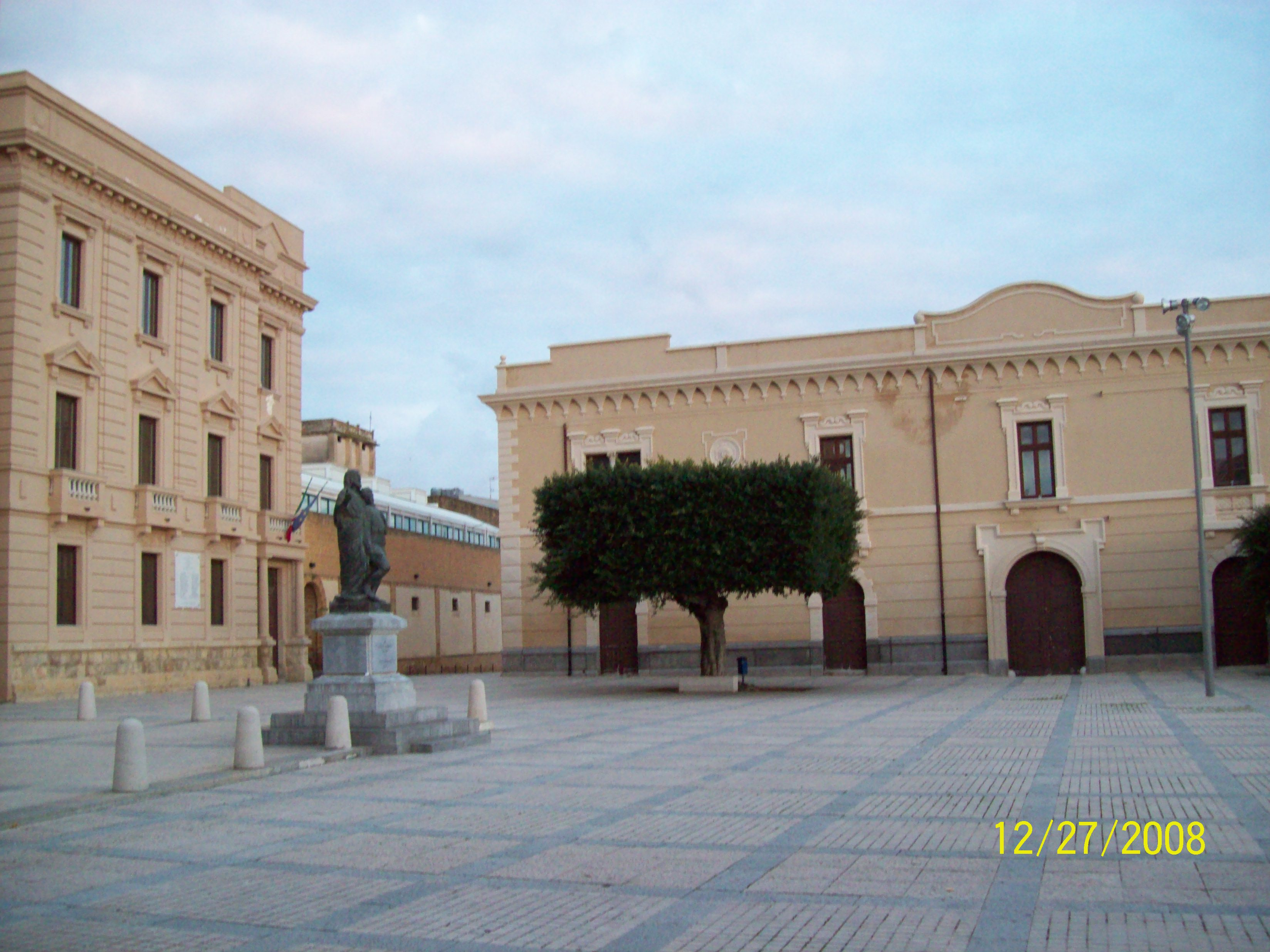 Menfi (provincia di Agrigento): piazza Vittorio Emanuele